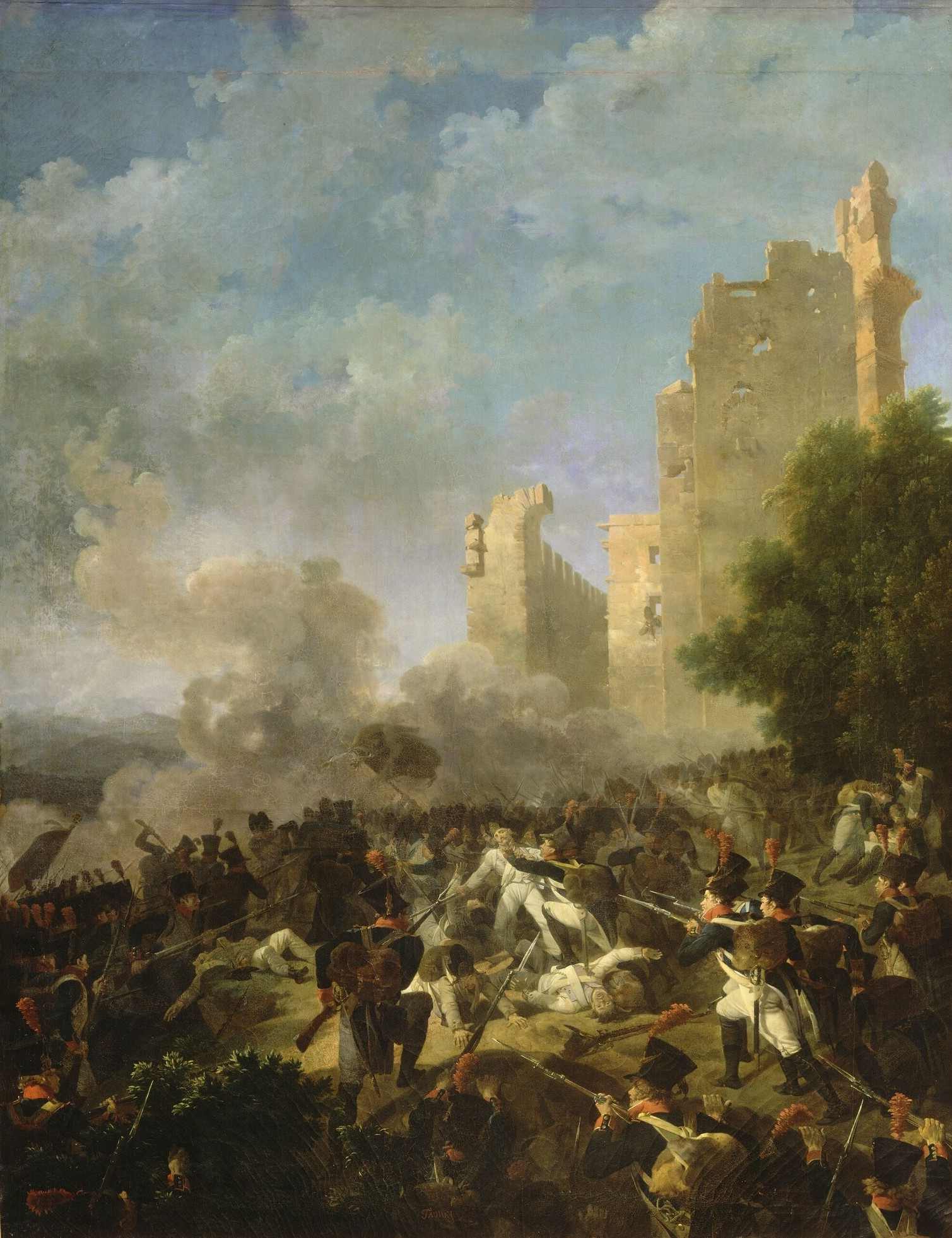 Attaque du château de Cossaria, 13 avril 1796. Campagne d'Italie (1796-1797).